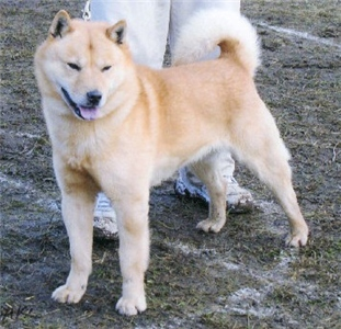 撮影者から掲載了承済み。 Hokkaidou inu